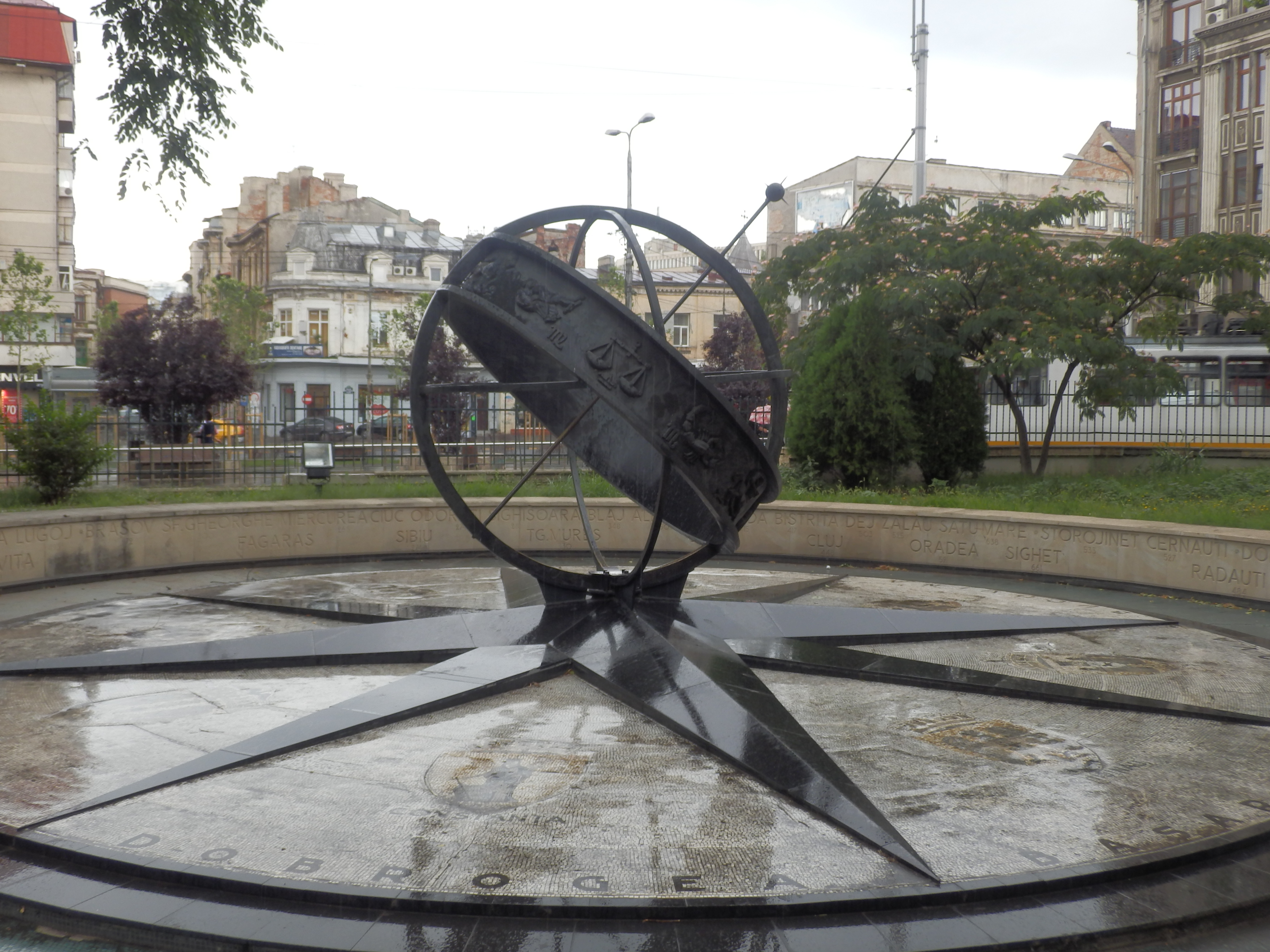 Bucharest, Romania